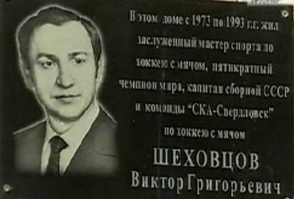 5-кратный чемпион мира по хоккею с мячом